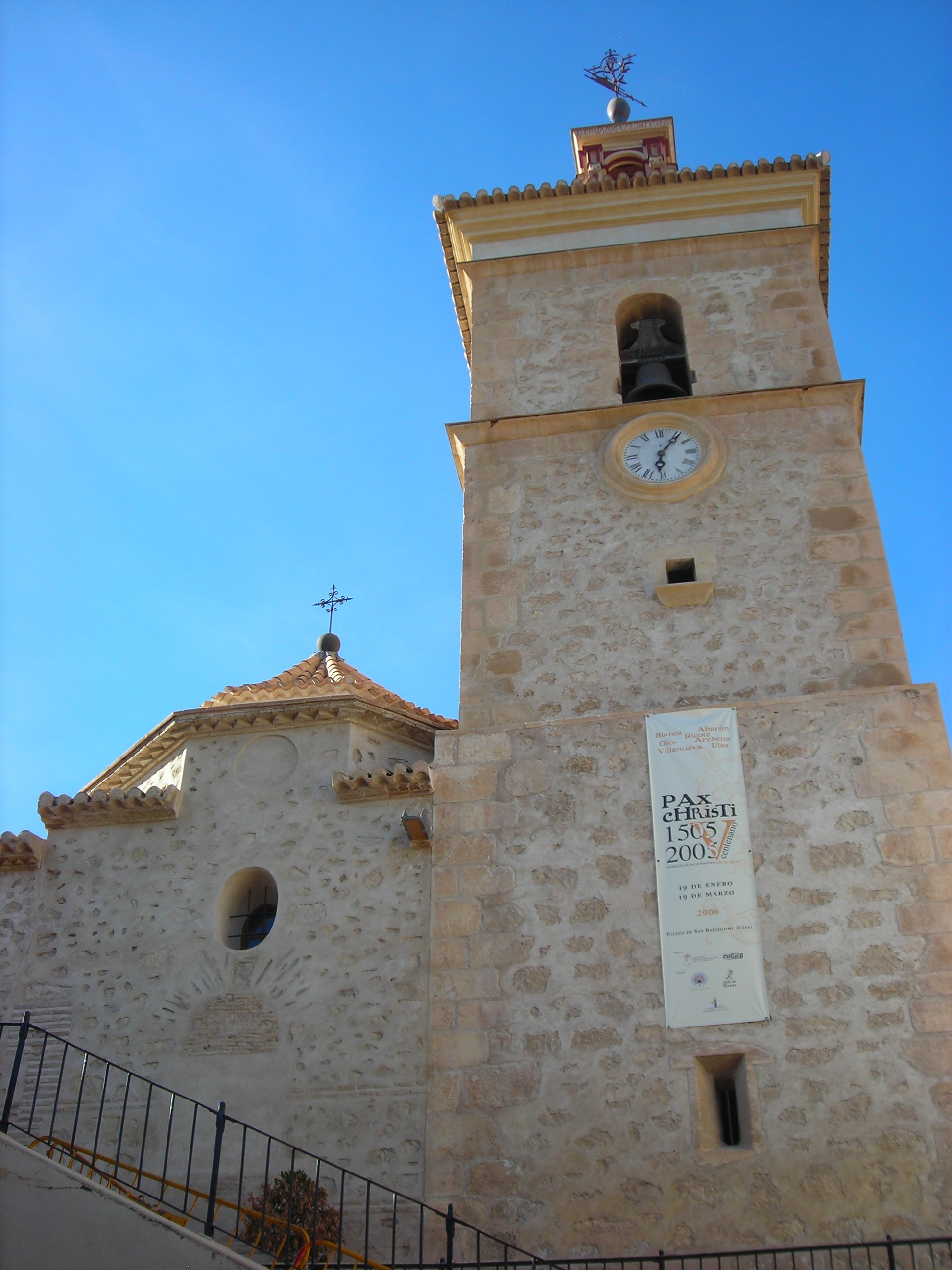 Iglesia de San Bartolomé, en Ulea (Murcia).